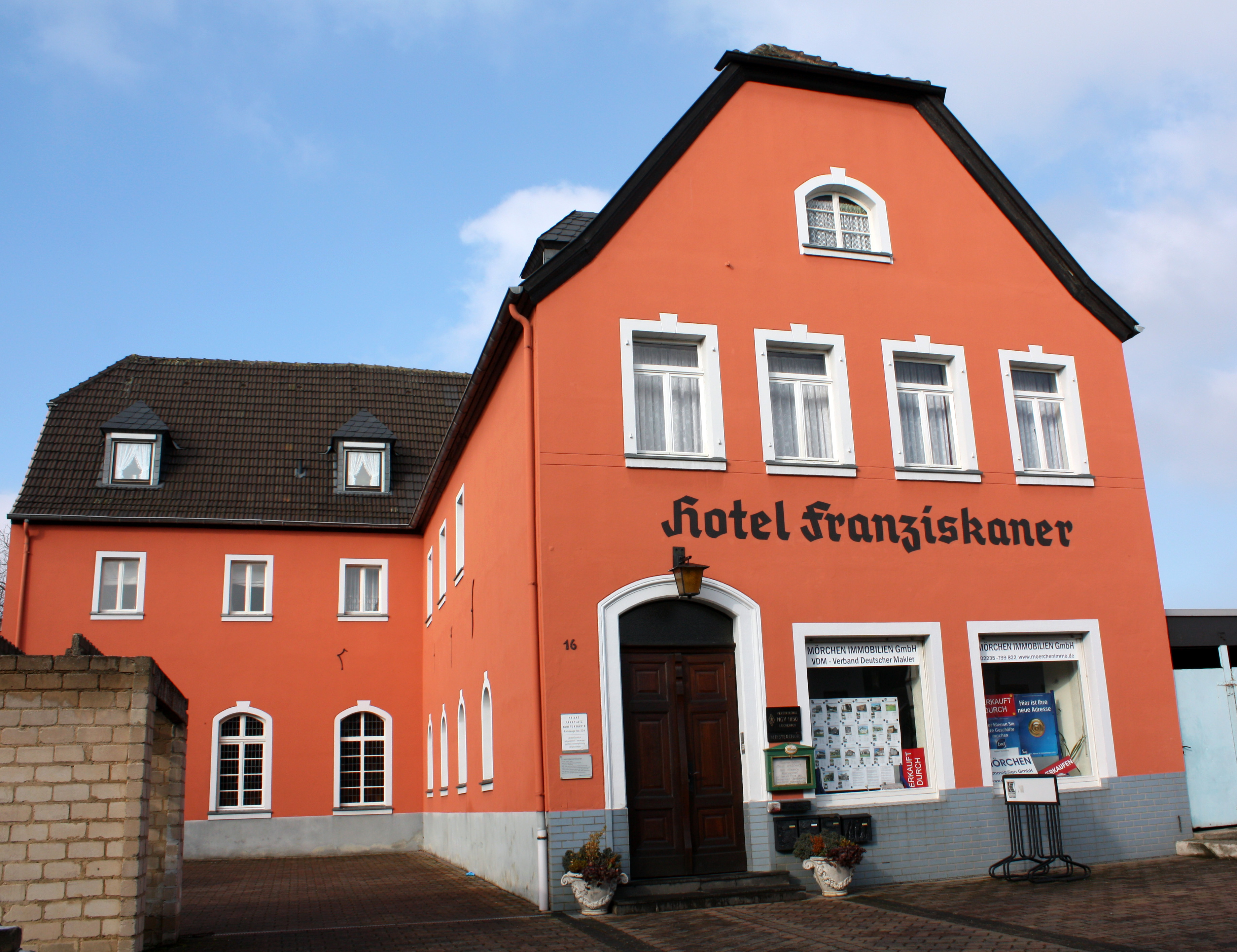 Lechenich, Hotel Franziskaner